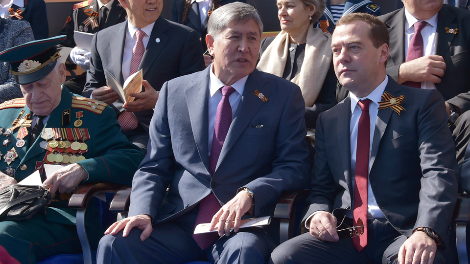 Парад в честь 70-летия Великой Победы